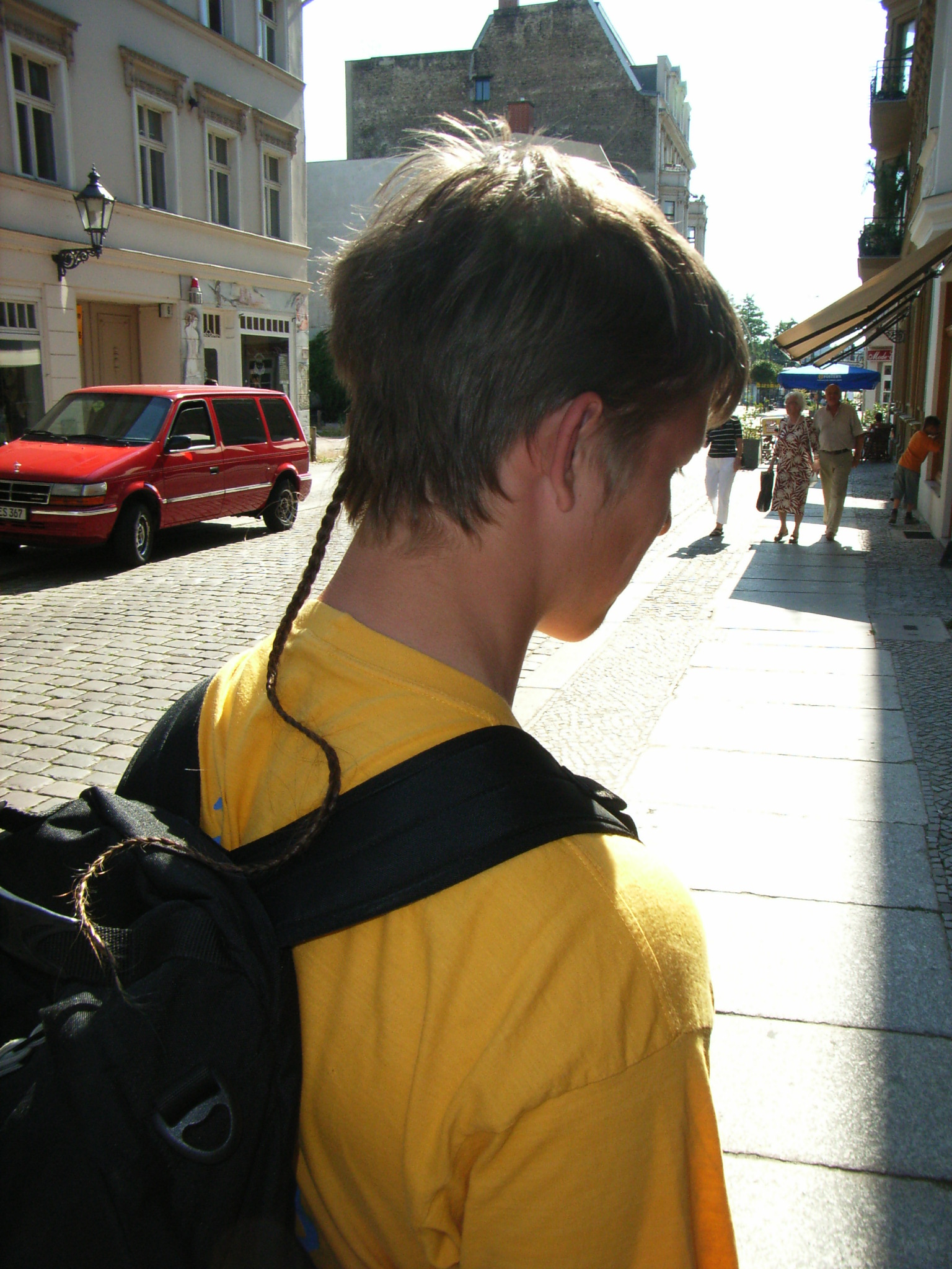 schwanz von Jcornelius, aufgenommen während der V. KNORKE-Tour in Berlin-Köpenick